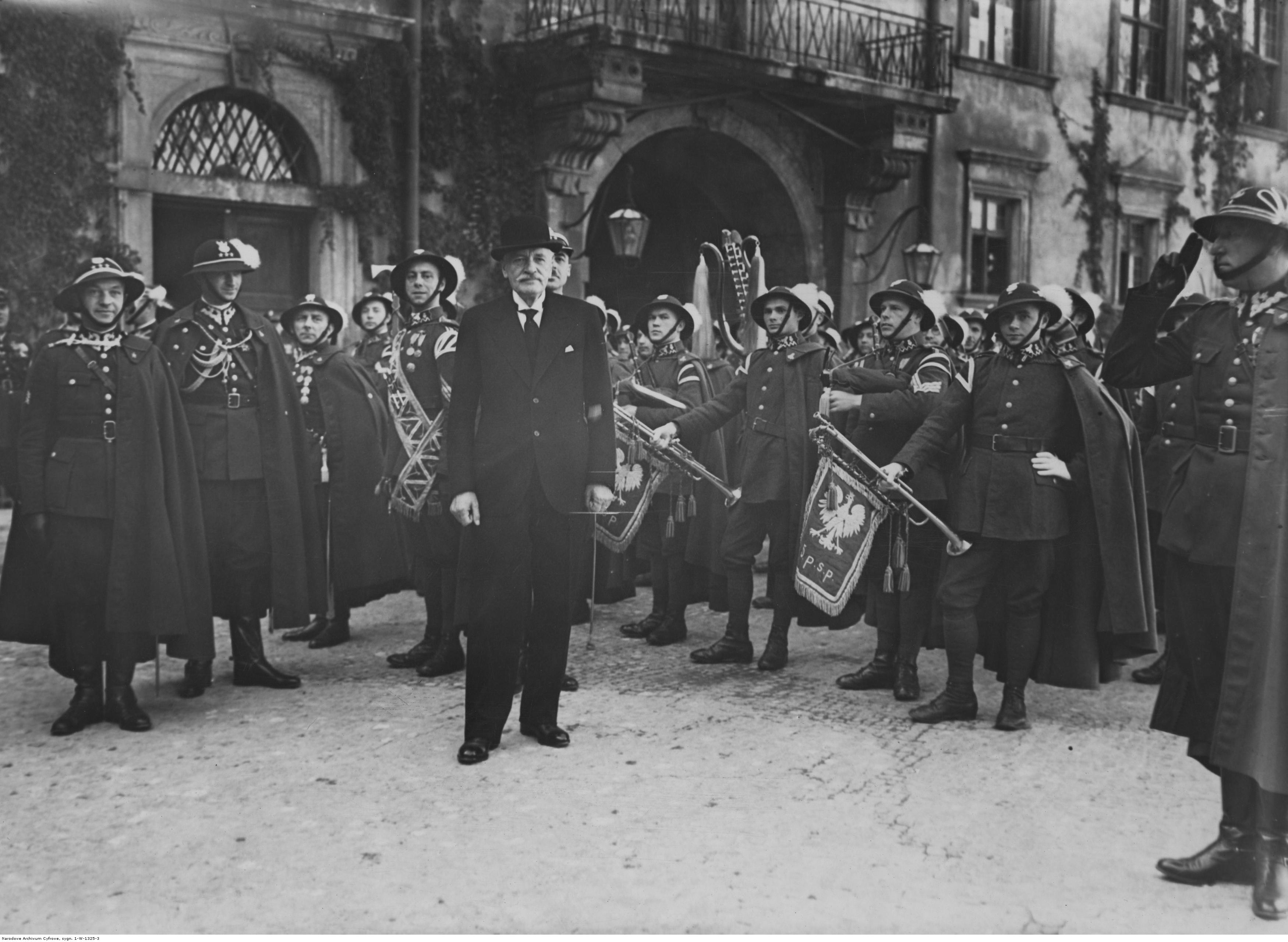 Wizyta 5 Pułku Strzelców Podhalańskich w Warszawie; 1935 r. Prezydent Ignacy Mościcki wśród żołnierzy Pułku na dziedzińcu Zamku Królewskiego. Widoczni także m.in.: adiutant prezydenta RP kpt. Strzelców Podhalańskich Józef Hartman (2. z lewej) i płk Kazimierz Schally (za prezydentem). Koncern Ilustrowany Kurier Codzienny - Archiwum Ilustracji. Sygnatura: 1-W-1325-3